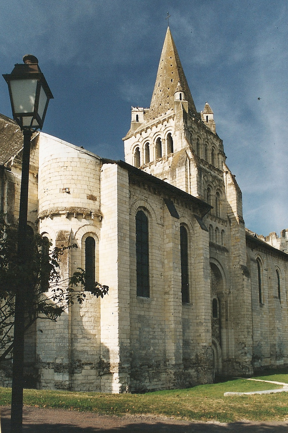 N.-D. Cunault,Langhaus von NO